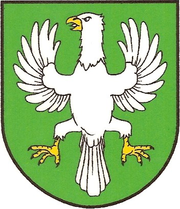 Wappen von Orlov Slowakei